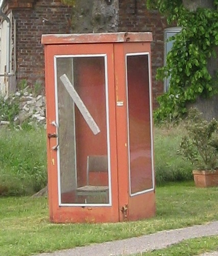 Fernsprechhäuschen vom Typ TelH 55, rot nachlackiert